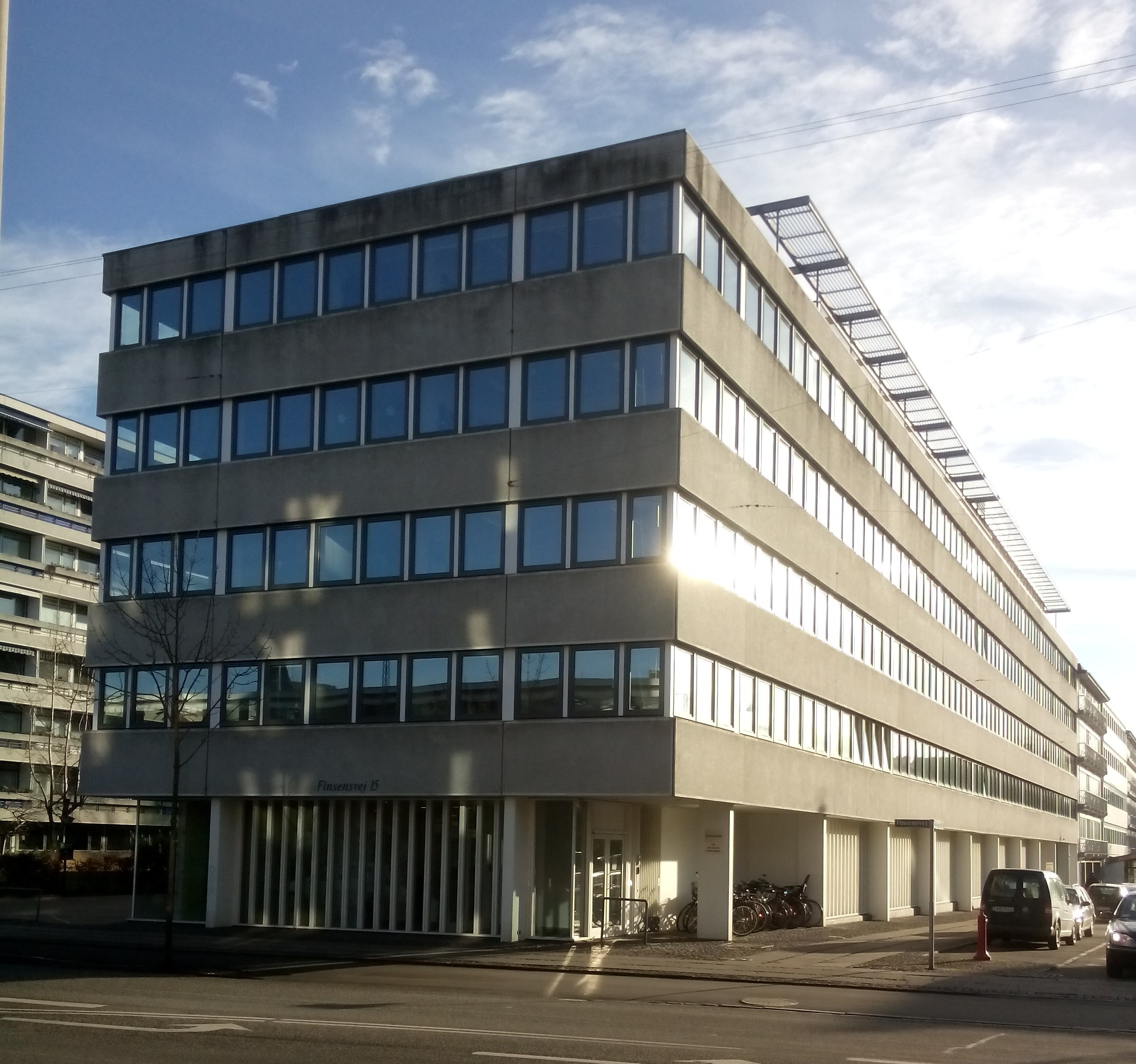 Patientombuddets hovedvarter på Frederiksberg